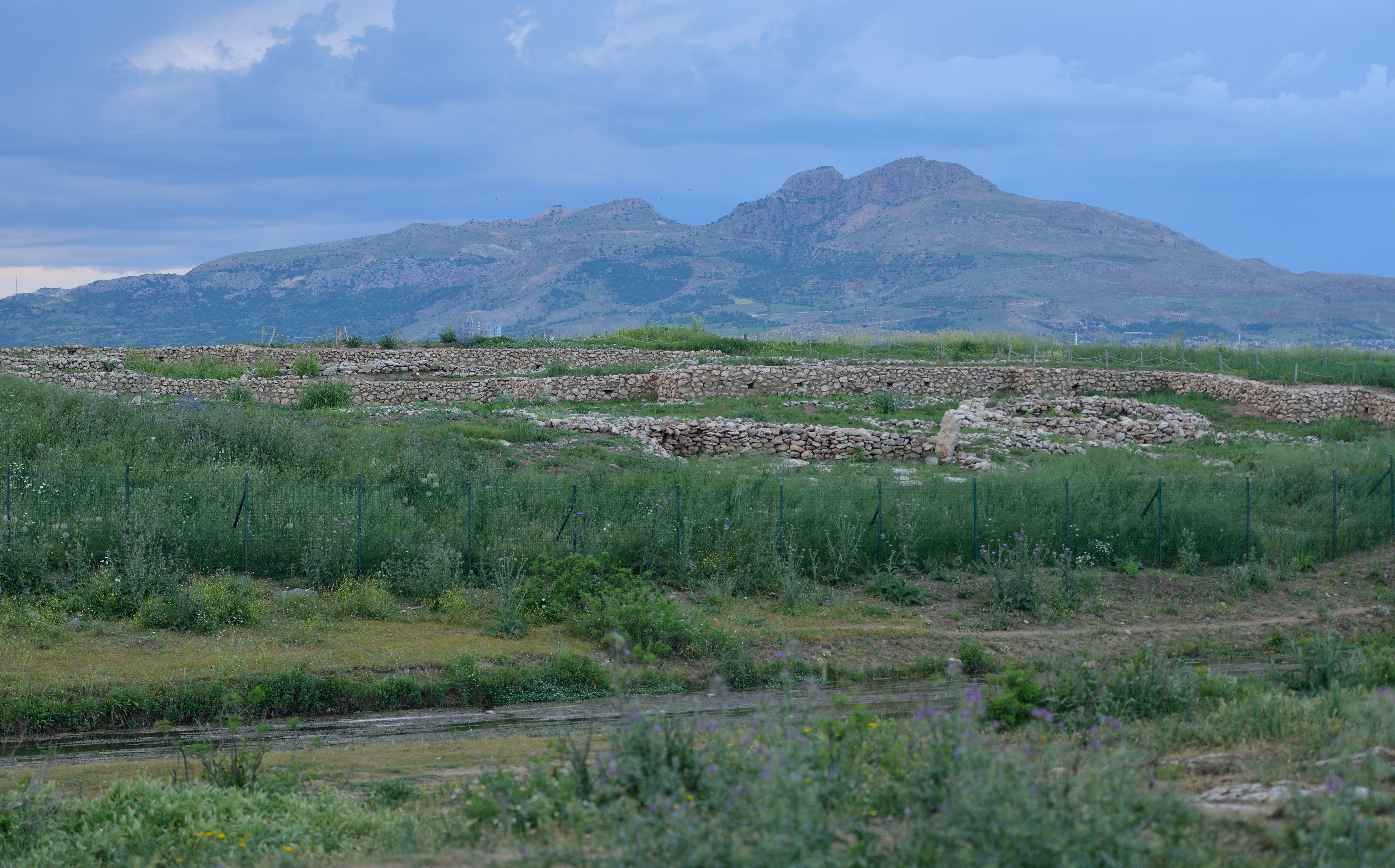 Kurdî: Qota Berçem, ciyê yekem ê niştecihiyê